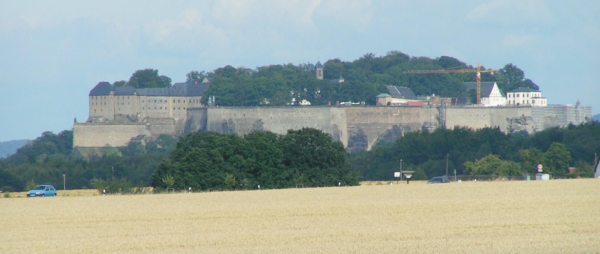 Festung Königstein, aus Richtung Pirna betrachtet